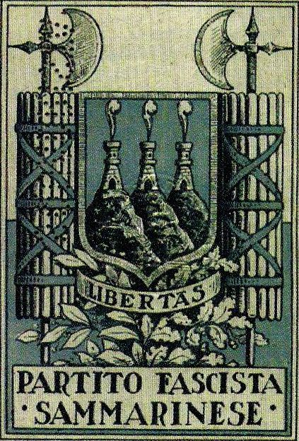 Logo del PFSM